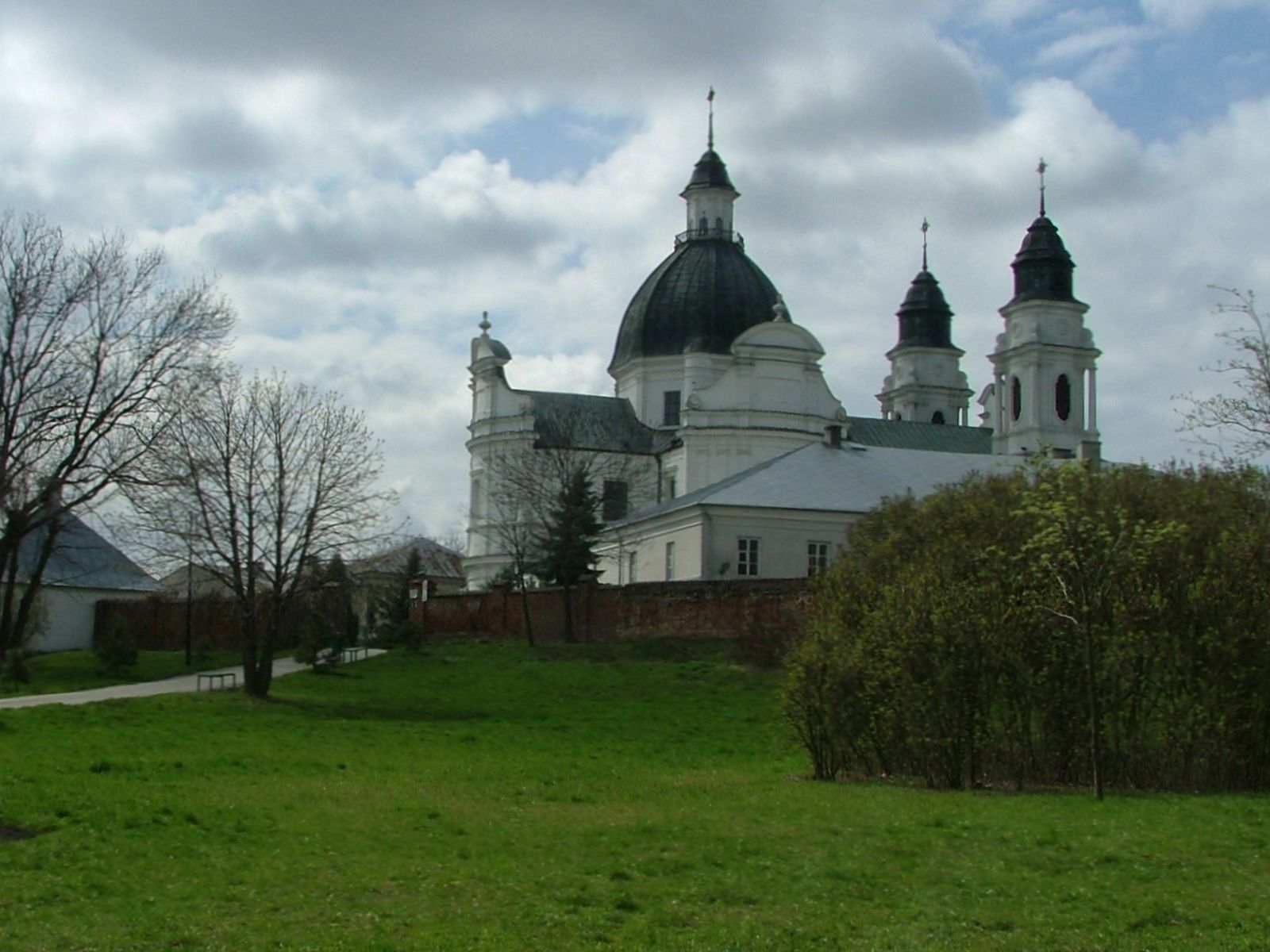 Chełm - Sanktuarium Maryjne na Górze Chełmskiej